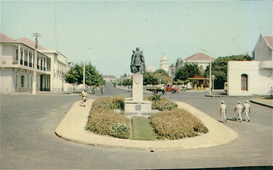 Postcard: Foto Serra No 120 - Monumento a Nuno Tristão - Bissau